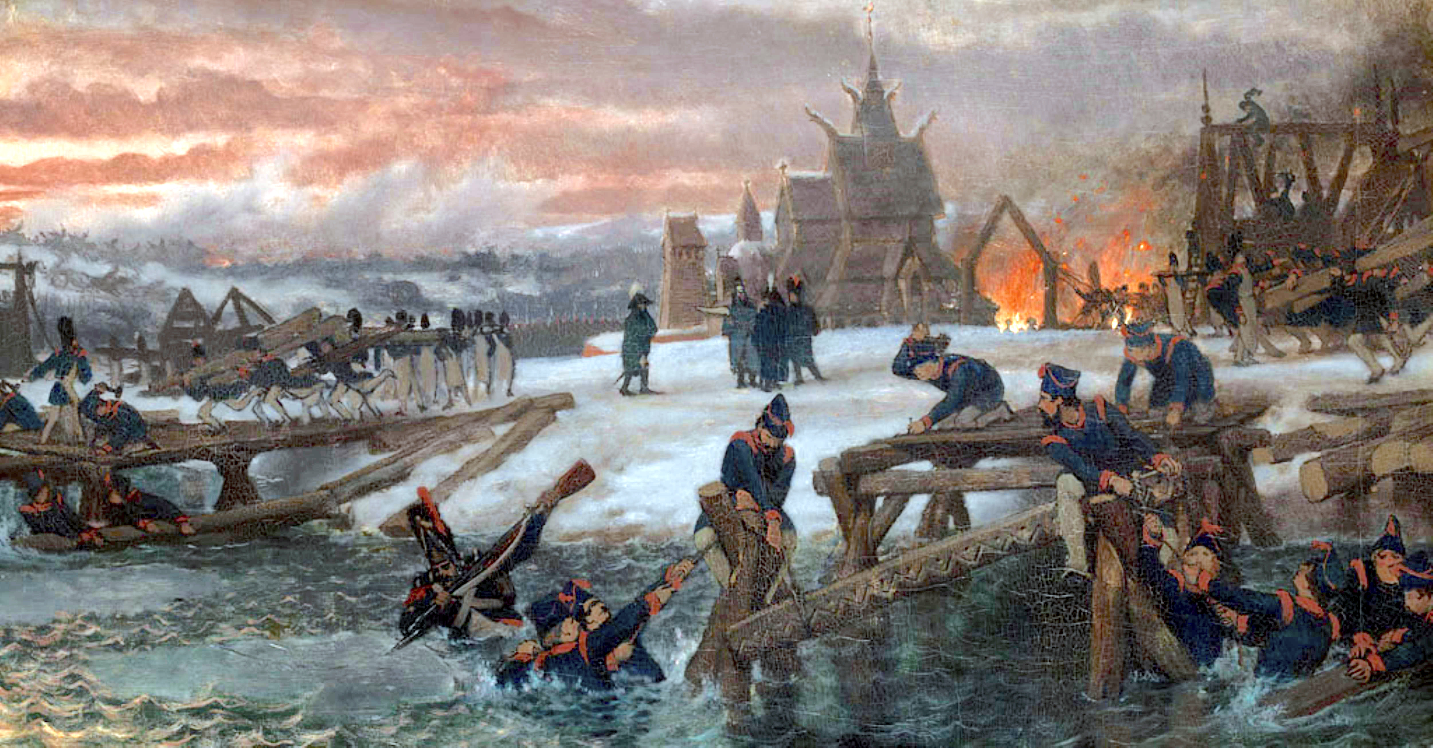 Les pontonniers sous les ordres du capitaine Benthien au travail sur la rivière Bérézina le 26 novembre 1812, construisant les deux ponts temporaires qui sauveront une partie de la grande armée de Napoléon.